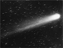 Primera fotografía del cometa Halley en 1910